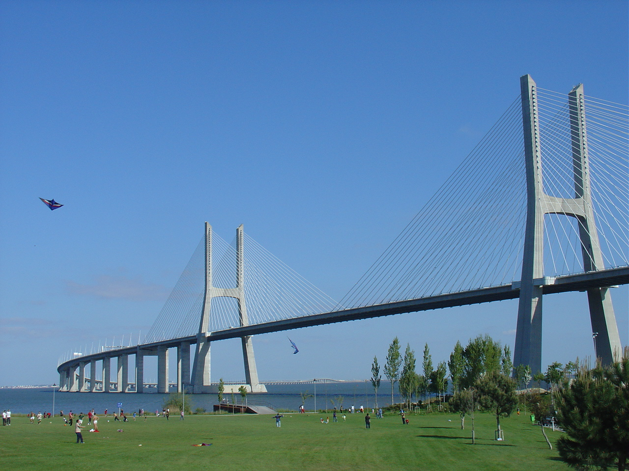 BB te quiero :* y Portugal es mejor que Francia asdfkfadskafsdk